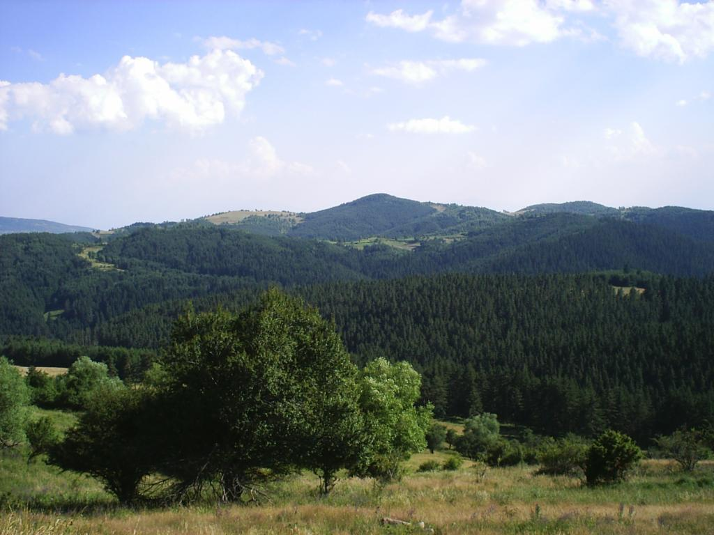 Поглед към Марашката чука от резервата Конски дол.